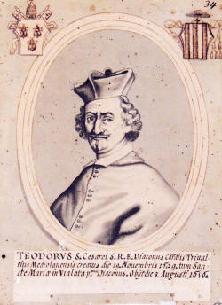 Cardinal Teodoro Trivulzio